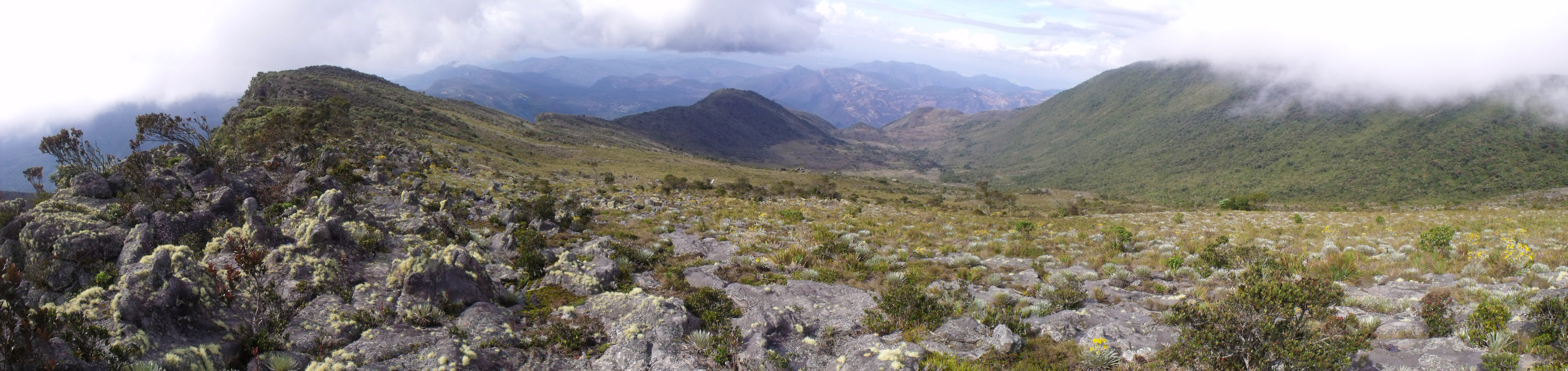 Páramo Los Nepes se encuentra al final de las montañas que asciende desde la Cascada del Vino, en el Parque Nacional Dinira.